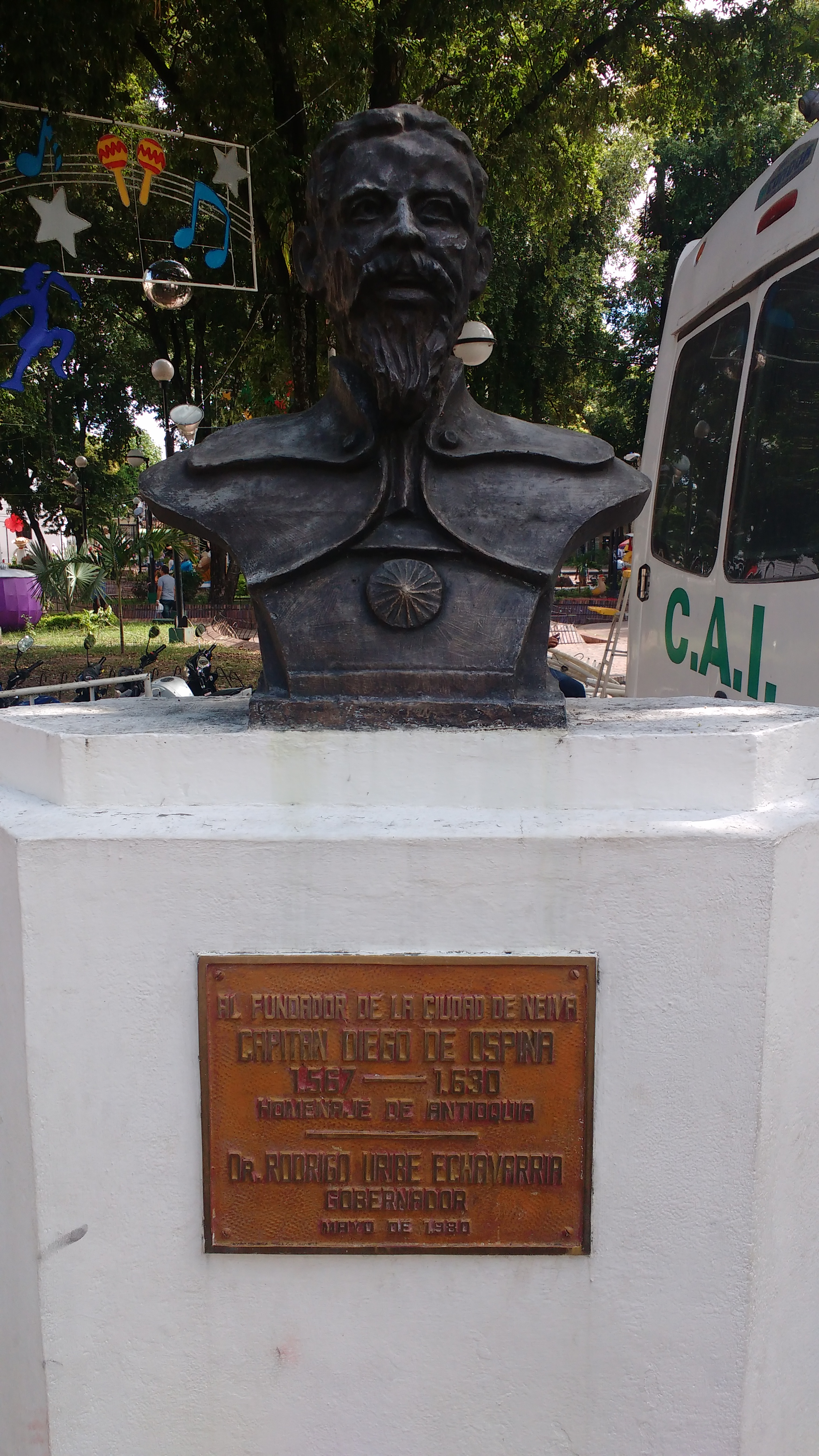 Busto de Diego de Ospina y Medinilla ubicado en el parque Santander en Neiva, Huila.